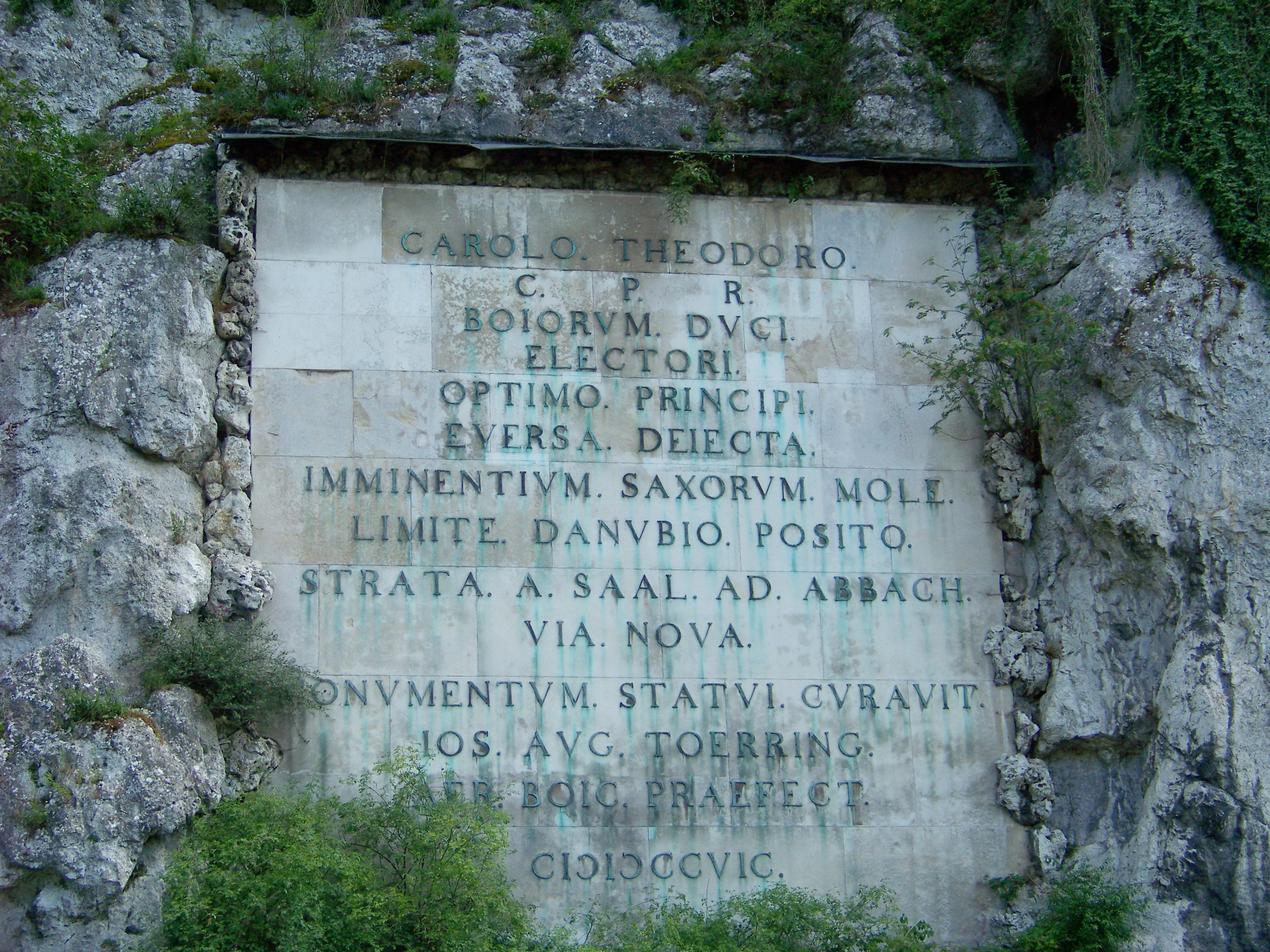 Bad Abbach, Eiermühle, Mühlberg. Inschrifttafel zur Erinnerung an den Straßenbau unter Adrian von Riedl, bezeichnet 1797, Hofsteinmetz Michael Mattheo. Text lateinisch.